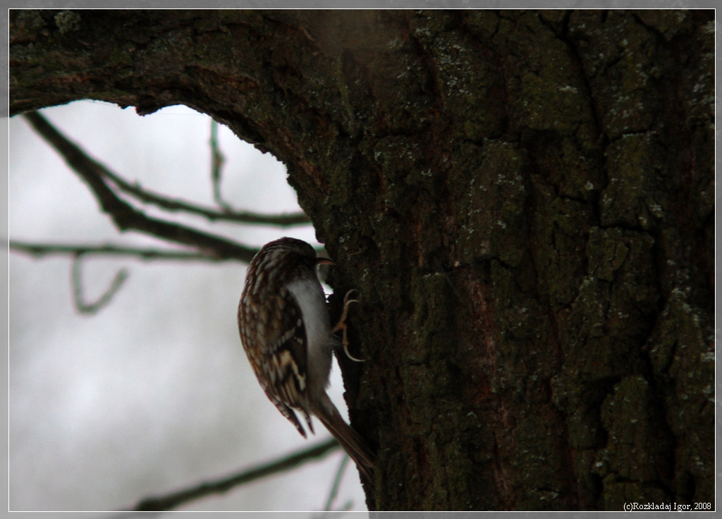 Підкоришник звичайний взимку (Certhia familiaris)